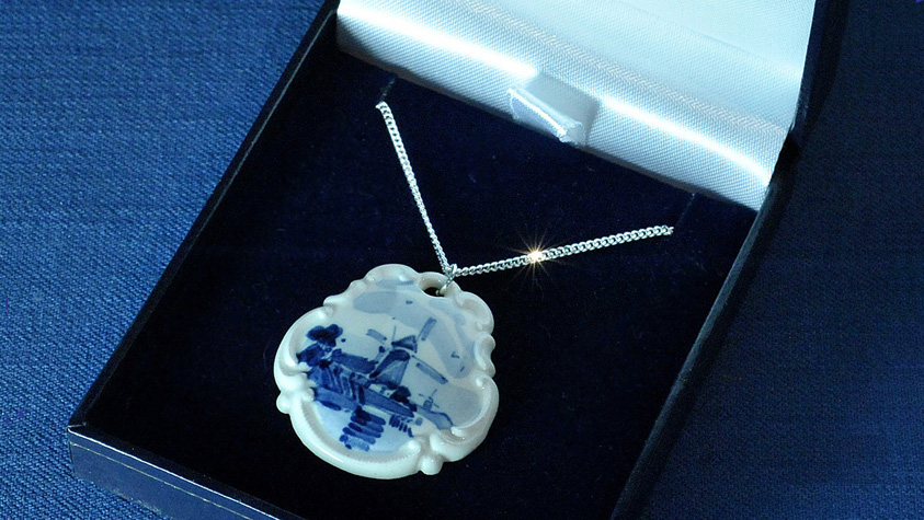 Verwoerd Delfts blauwe hanger 1952